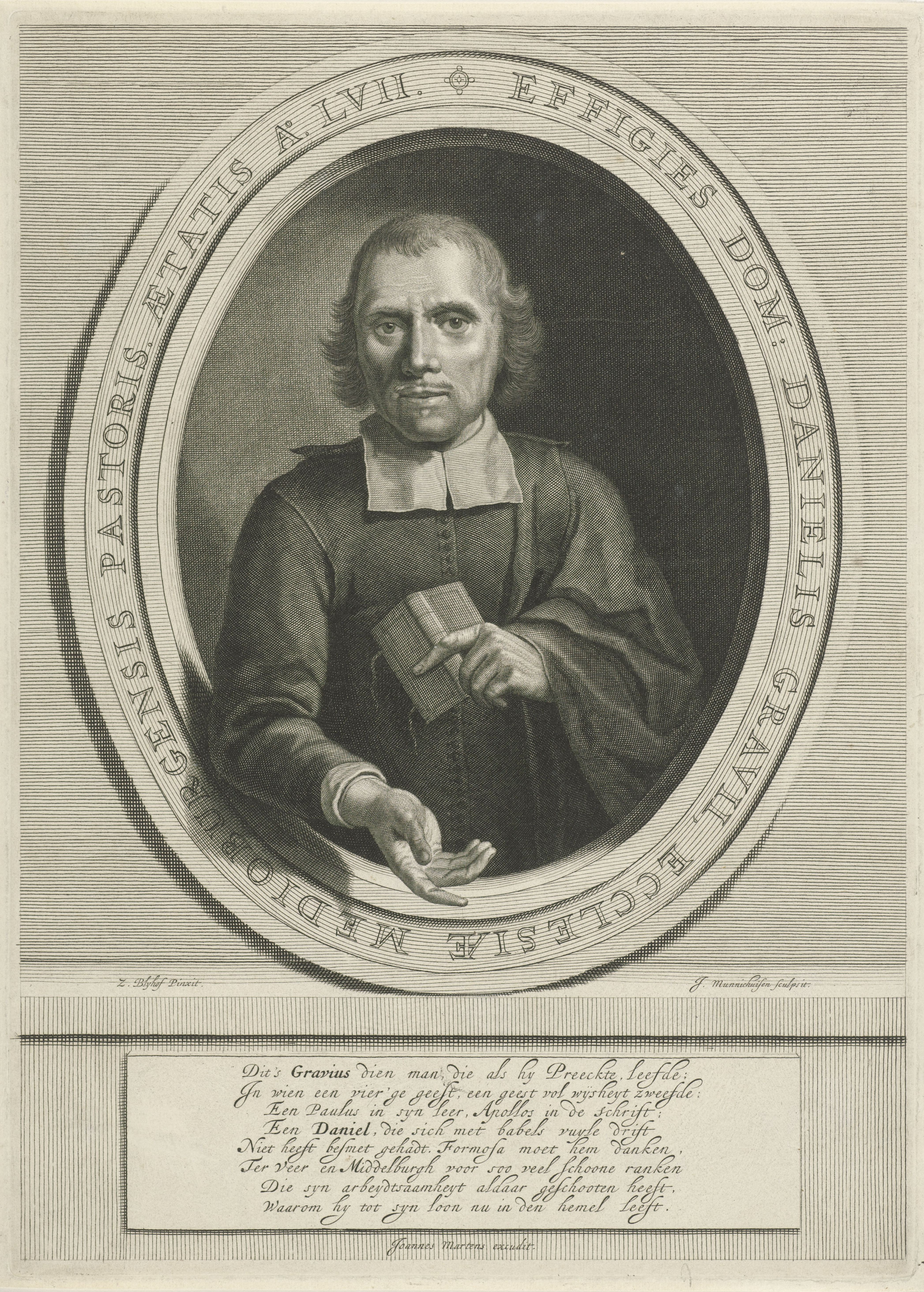 IdentificatieTitel(s): Portret van Daniël GraviusObjecttype: prent Objectnummer: RP-P-1884-A-7969Catalogusreferentie: Hollstein Dutch 15FMP 1985-aOpschriften / Merken: verzamelaarsmerk, verso, gestempeld: Lugt 2228Omschrijving: Portret van Daniël Gravius, predikant te Middelburg, met een Bijbel in zijn hand. Onderaan in de marge een achtregelig vers in het Nederlands.VervaardigingVervaardiger: prentmaker: Johannes Willemsz. Munnickhuysen (vermeld op object)naar schilderij van: Zacharias Blijhooft (vermeld op object)uitgever: Joannes Martens (vermeld op object)Plaats vervaardiging: NederlandDatering: 1664 - 1721Fysieke kenmerken: gravureMateriaal: papier Techniek: graveren (drukprocedé)Afmetingen: plaatrand: h 345 mm × b 249 mmOnderwerpWie: Daniël GraviusVerwerving en rechtenVerwerving: aankoop 1884Copyright: Publiek domein